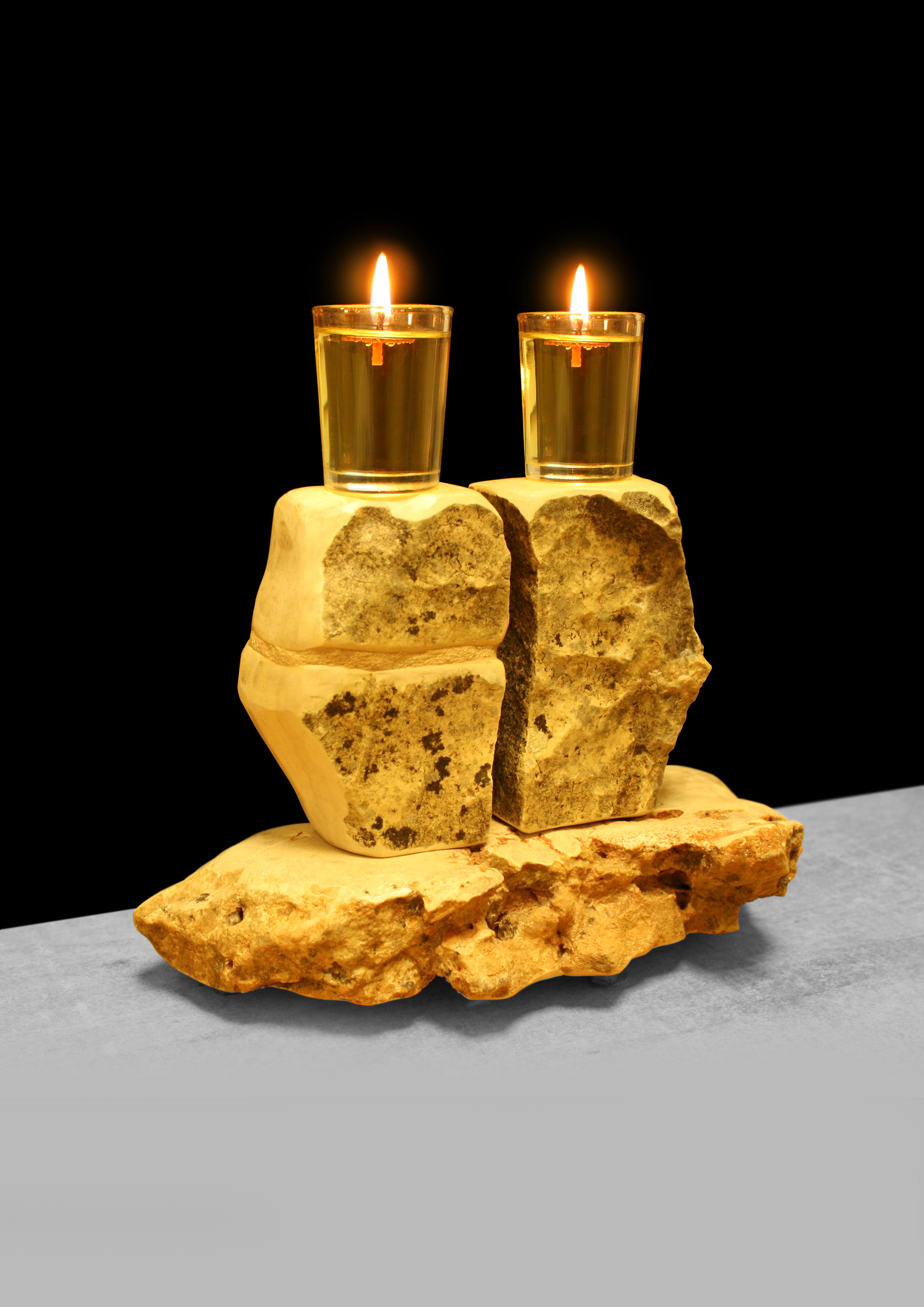 פמוטות שבת עשויות אבן, יצירת האמן אסף קדרון